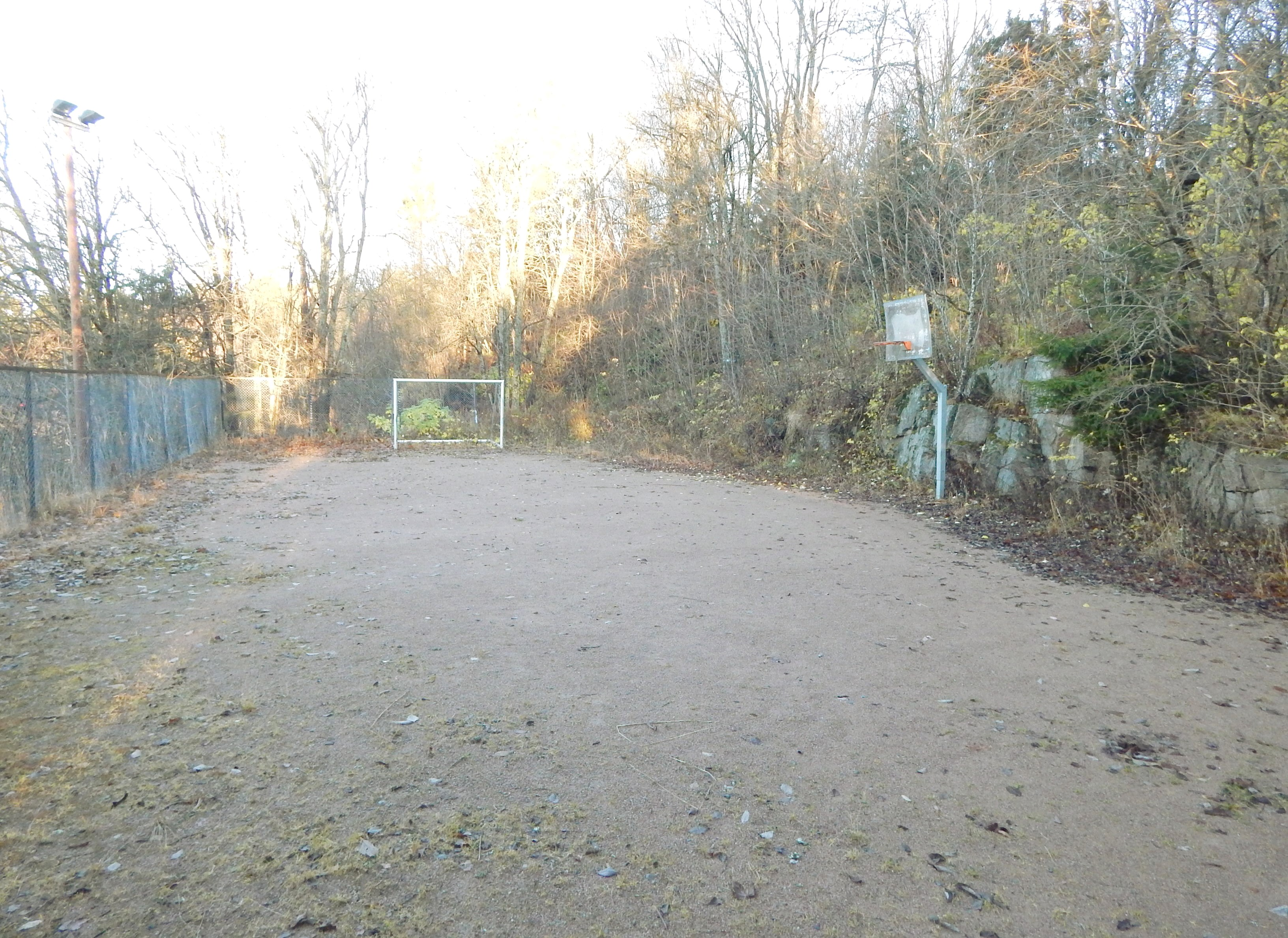 Anne Kure-banen